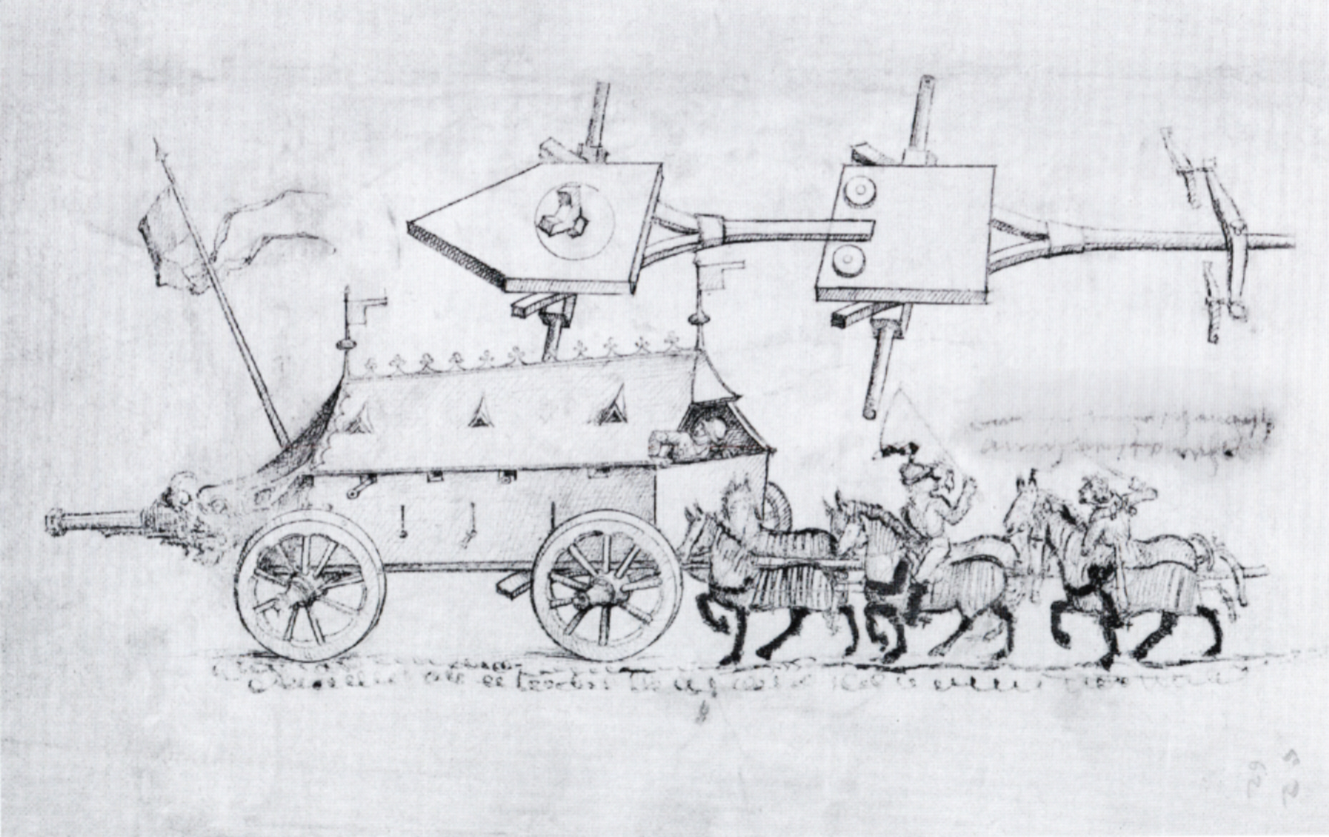 Mittelalterliches Hausbuch von Schloss Wolfegg Fol. 52v: Kampfwagen mit Chassis